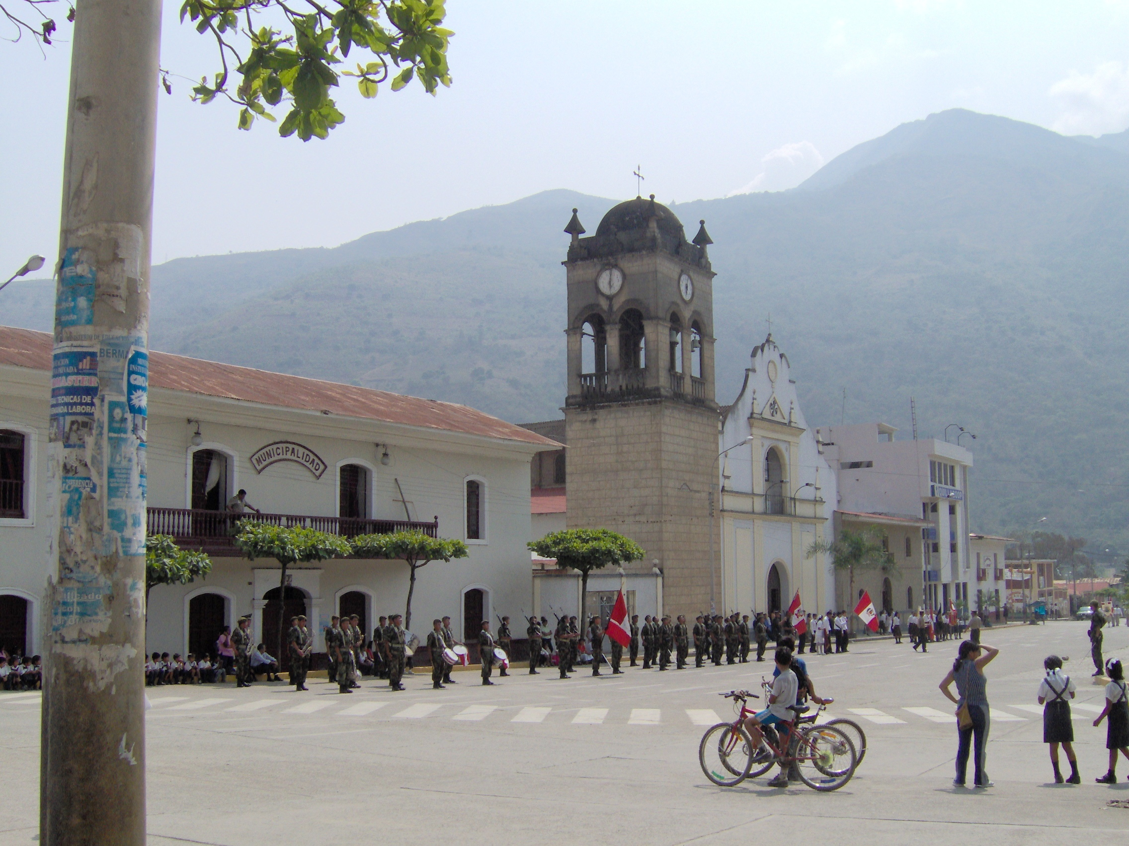 Detalles de la ciudad de Quillabamba, Cusco